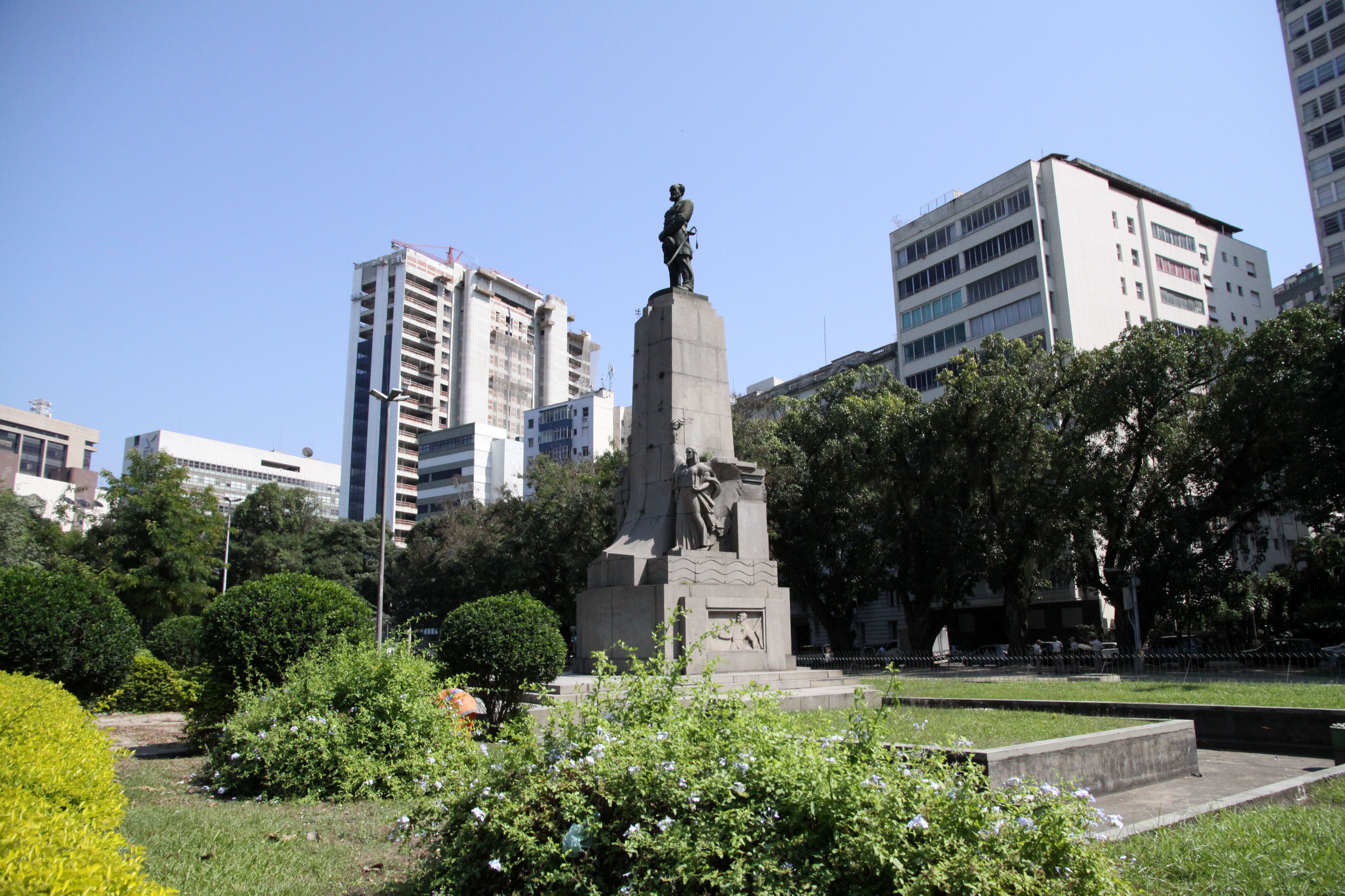 A inauguração do monumento data de dezembro de 1937, tendo transcorrido com acentuado brilhantismo e entusiasmo cívico. Estava marcada para o “Dia do Marinheiro” e fora incluída no programa de festejos desse dia. Entretanto, em virtude do mau tempo reinante, a solenidade foi transferida, efetuando-se no dia 28, às 16 horas. Fonte: Monumento ao Almirante Tamandaré, por Diário de Notícias